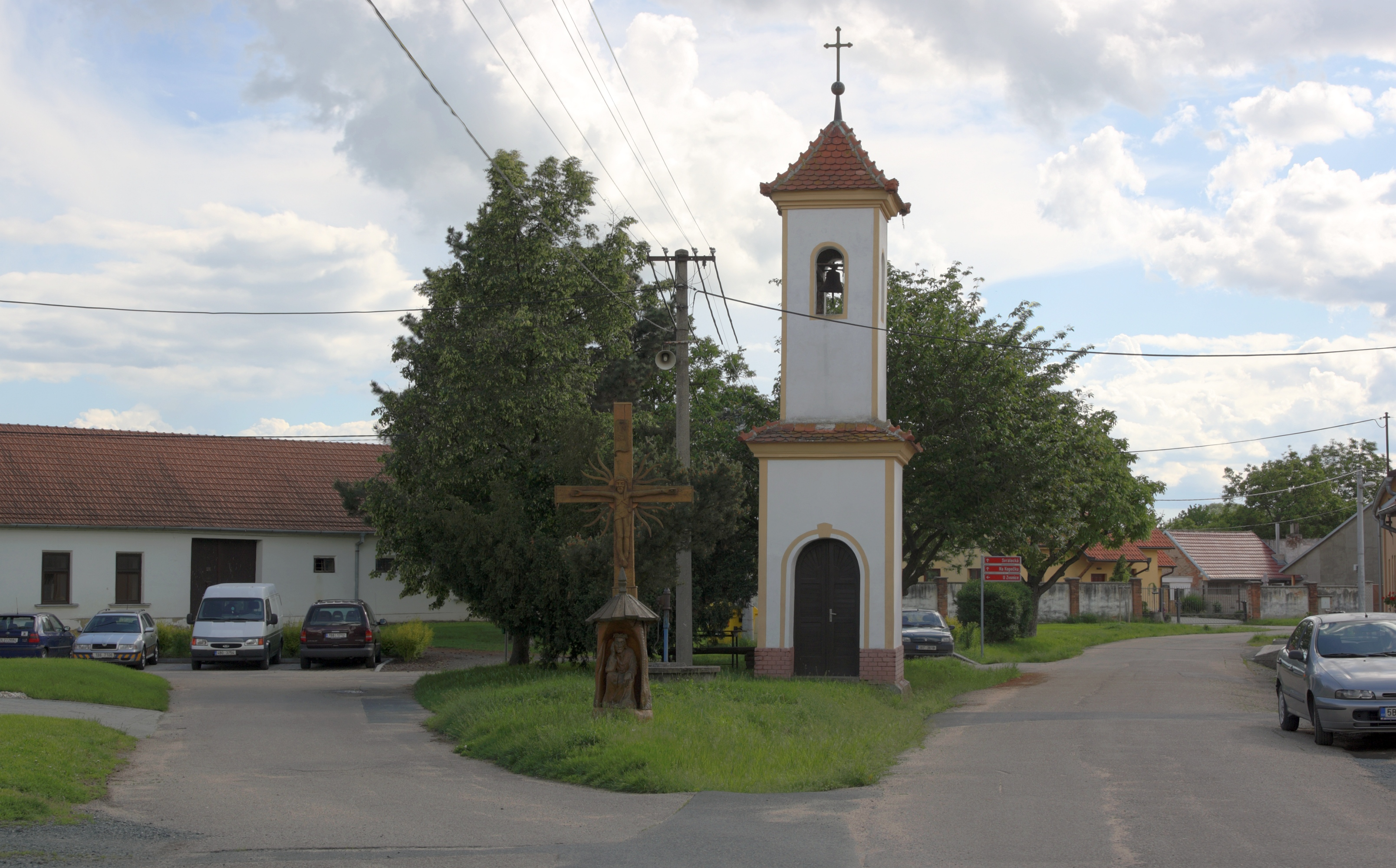 Rajhradice - náves bývalé obce Loučka se zvonicí z roku 1848.